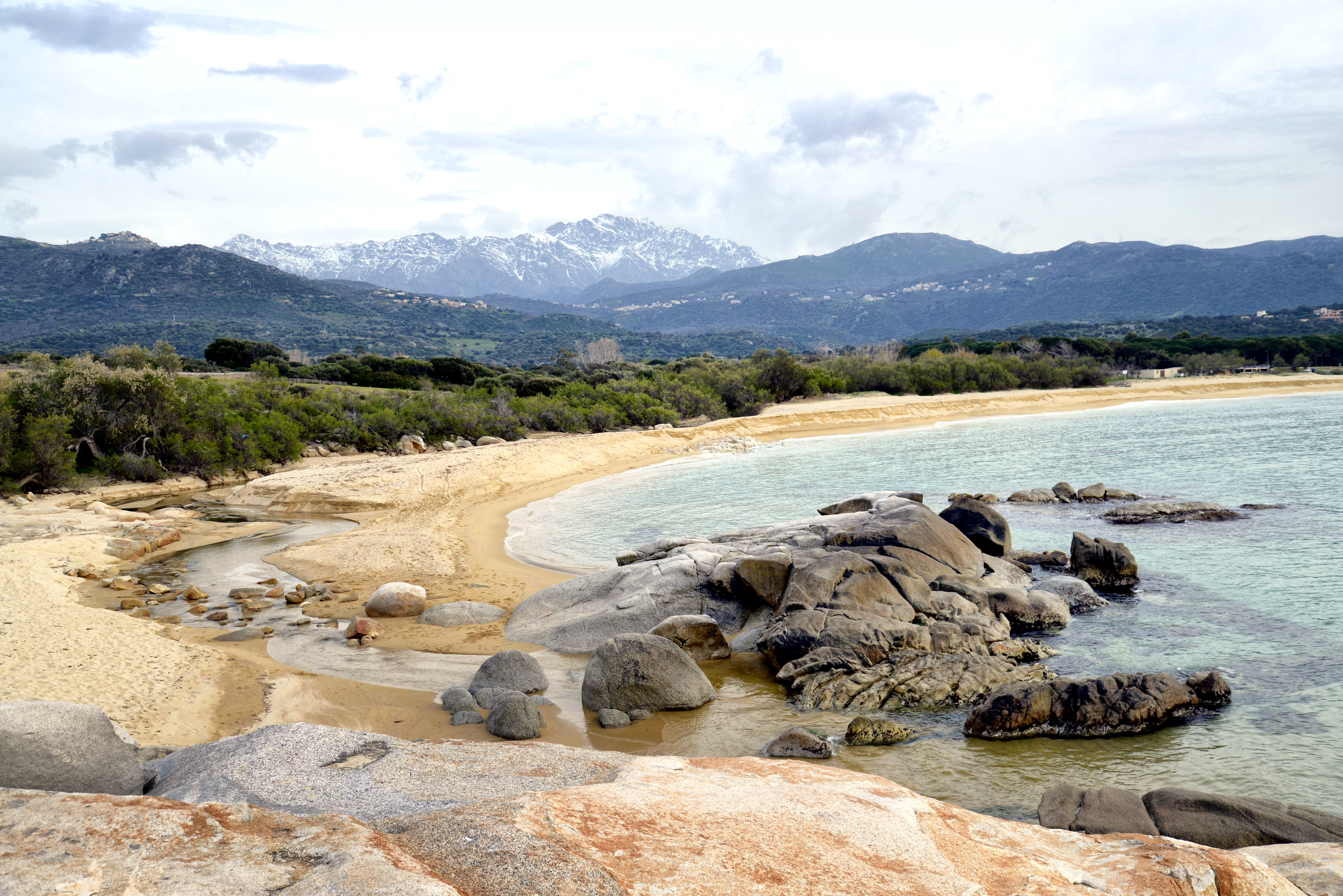 Aregno, Balagne (Corse) - Embouchure du ruisseau de Teghiella à l'extrémité orientale de la plage d'Aregno. À l'arrière-plan, les villages « en balcon » de Sant'Antonino, Aregno, Cateri et Lavatoggio, sur fond du Monte Grosso (1937 m)